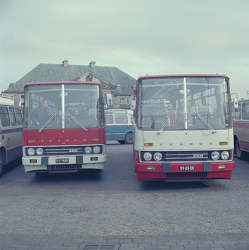 Original image description from the Deutsche FotothekFahrzeugscheiben